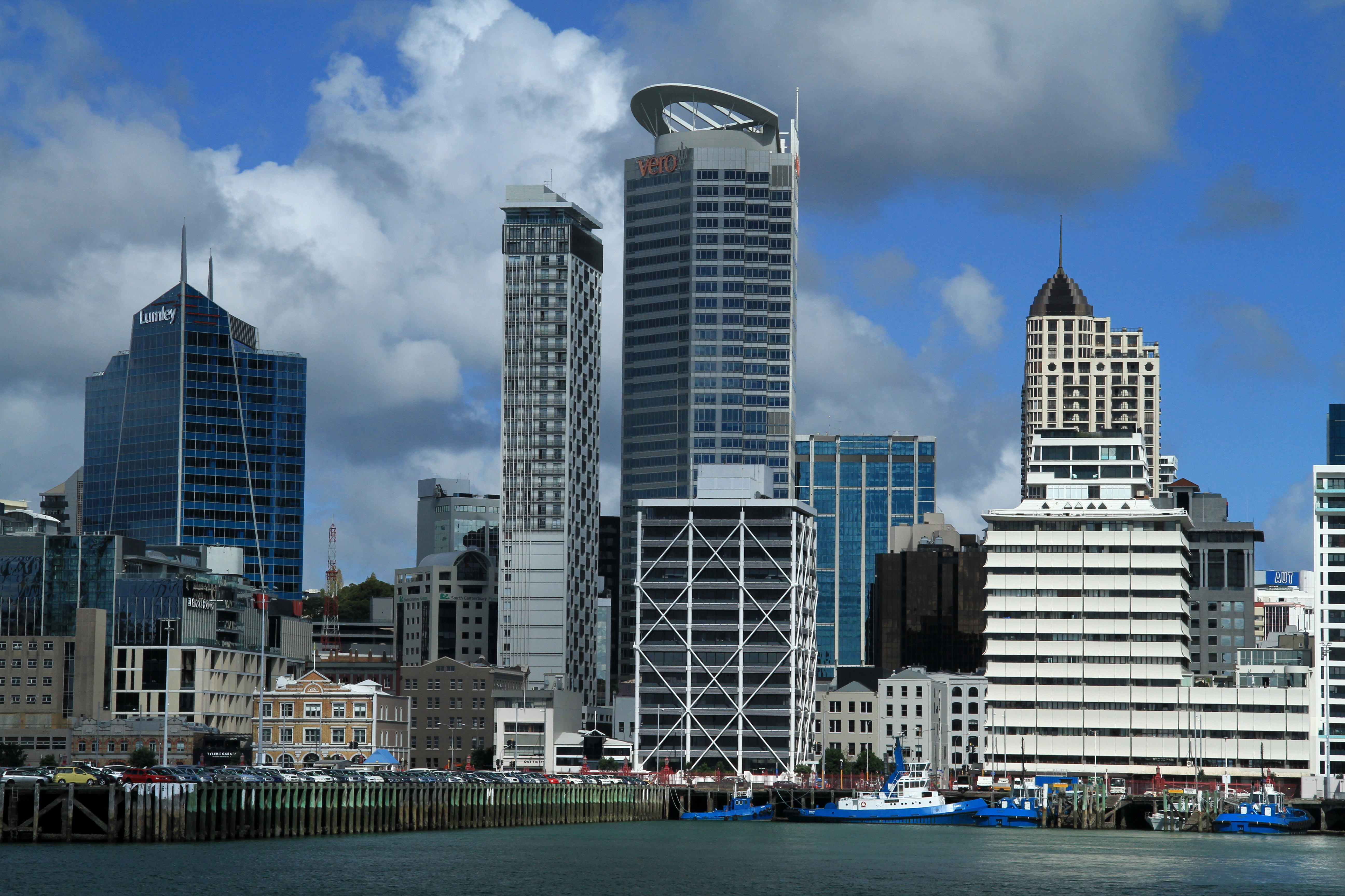 Auckland Harbour View 19